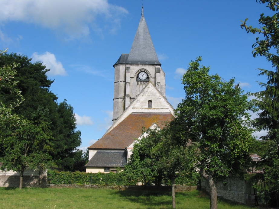 L'église Saint-Apré de Warlus (Somme).